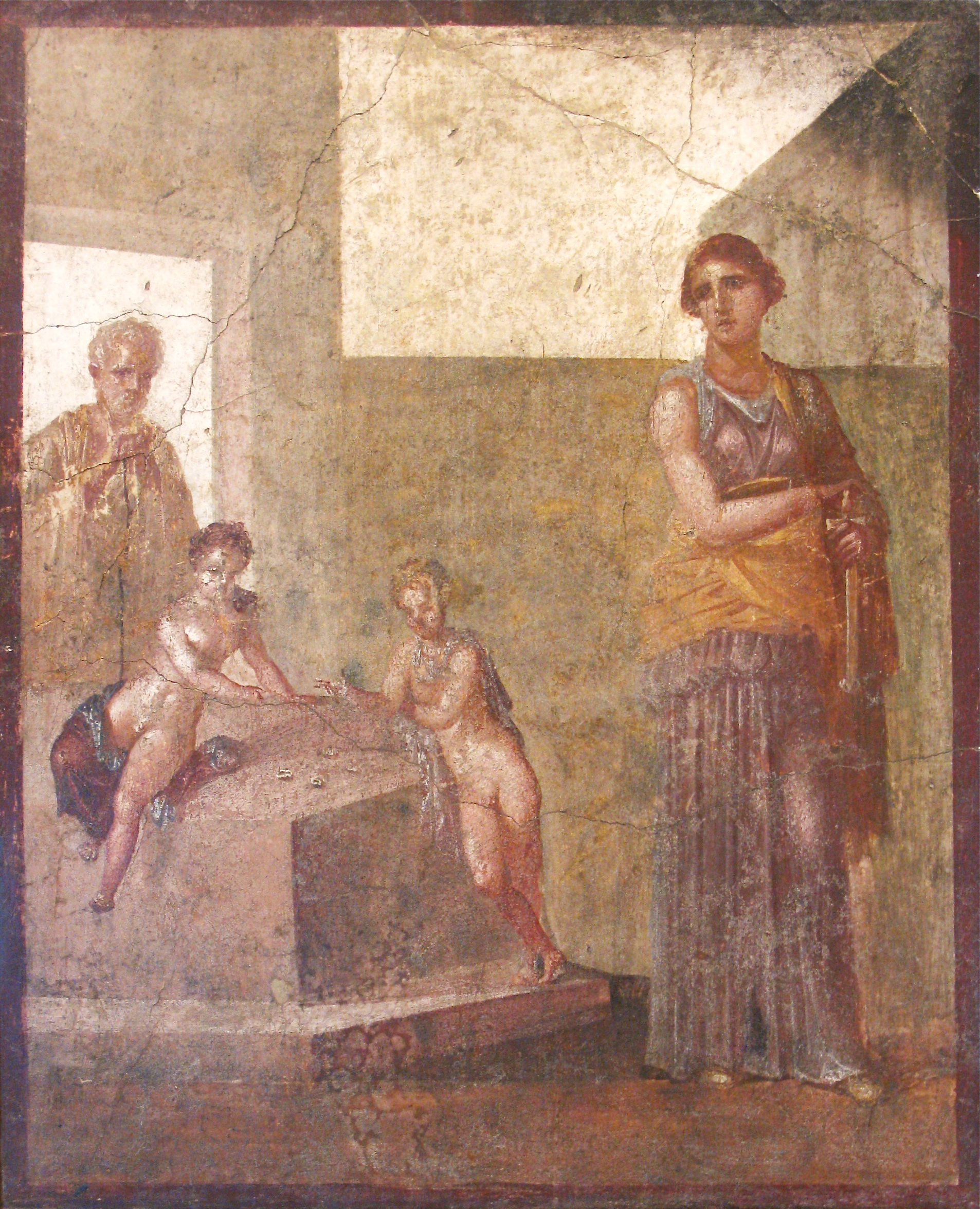 Medea, Museo archeologico nazionale di Napoli, (inv. nr. 8977). Da Pompei, Casa dei Dioscuri. Medea medita di uccidere i suoi figli intenti a giocare con gli astragali, guardati con mestizia dal pedagogo.